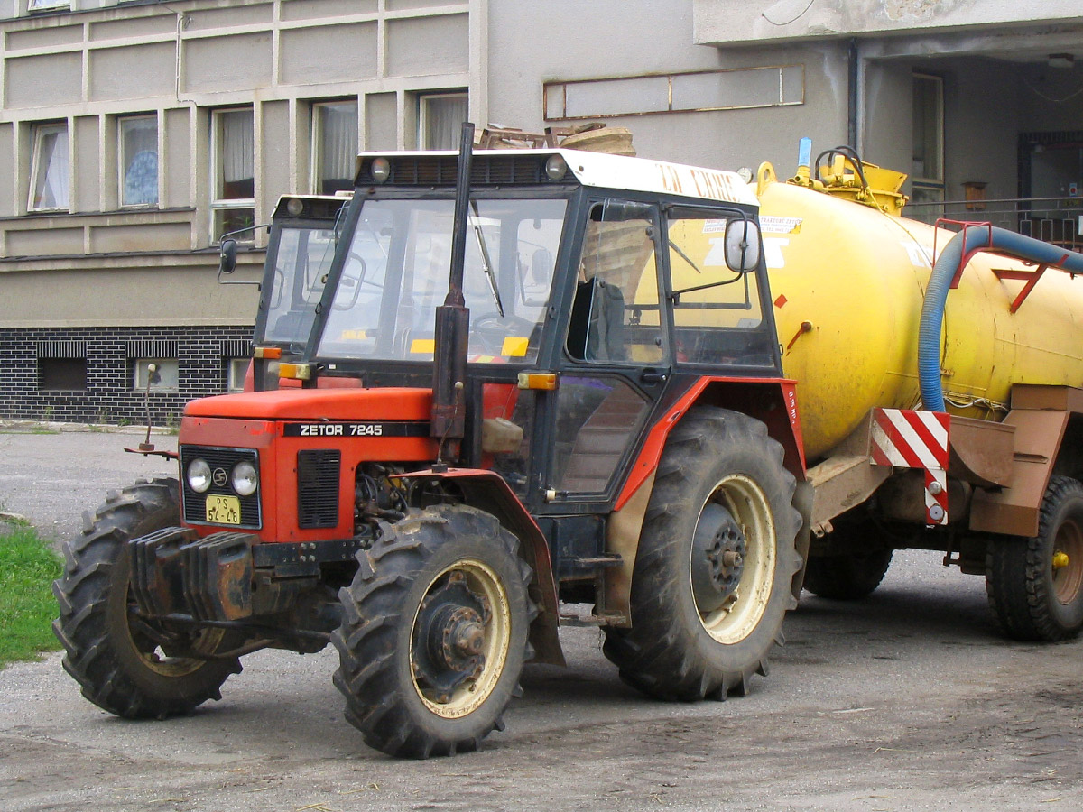 Zetor 7245 tractor, 2006-08-23.